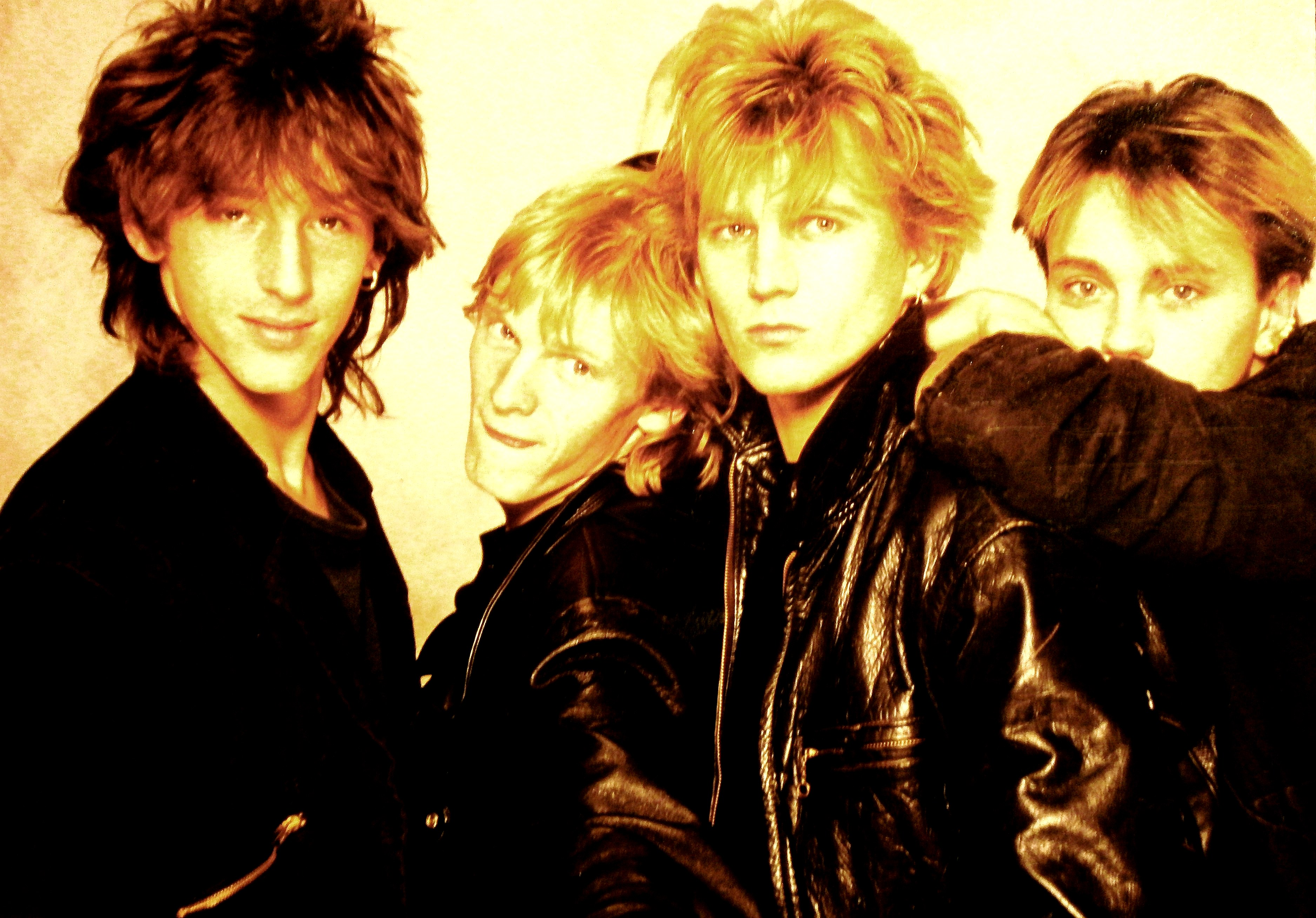 Marionetz1984 v.l.n.r. Django Schuster, Günther B, Sigi Pop, Michi Sailer